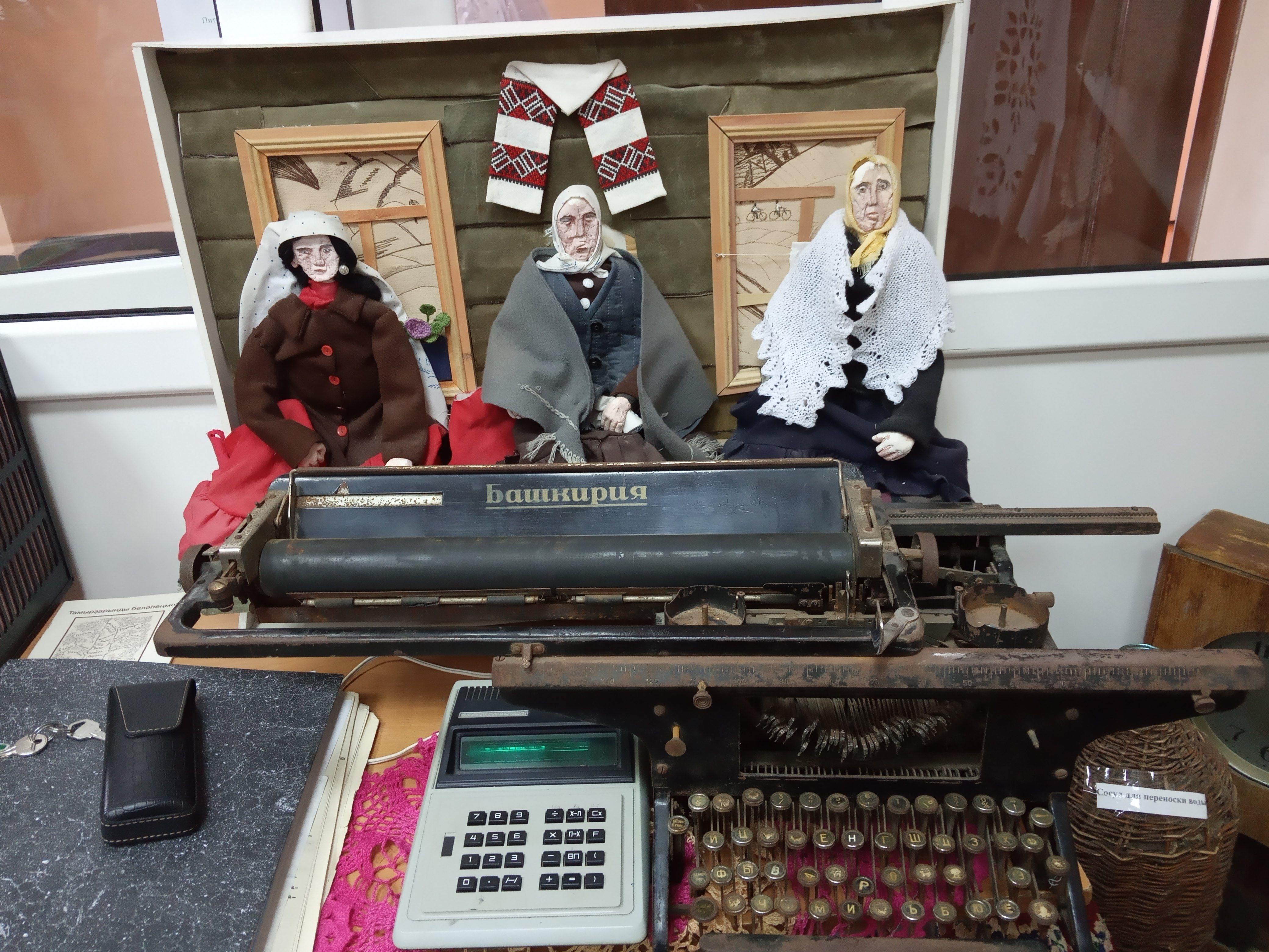 Башҡортса: Көйөргәҙе районы Мораптал ауылында мәктәп музейы